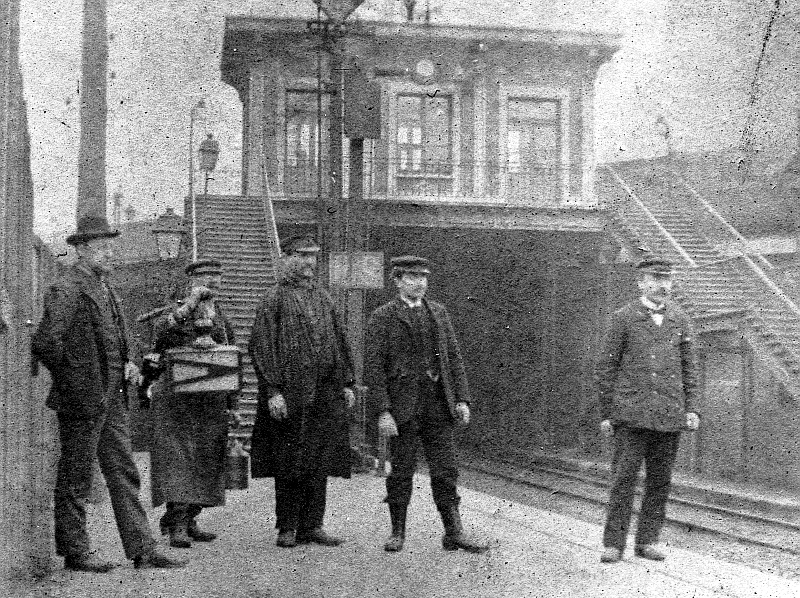 Quais de la gare d'Est-Ceinture, sur la ligne de Petite Ceinture, à Paris